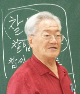 SUN MOON UNIVERSITY - CHEONAN - KOREA